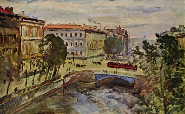 Произведения художника Николая Андреевича Тырса (1887 — 1942). Мойка у Синего моста. Государственный Русский музей